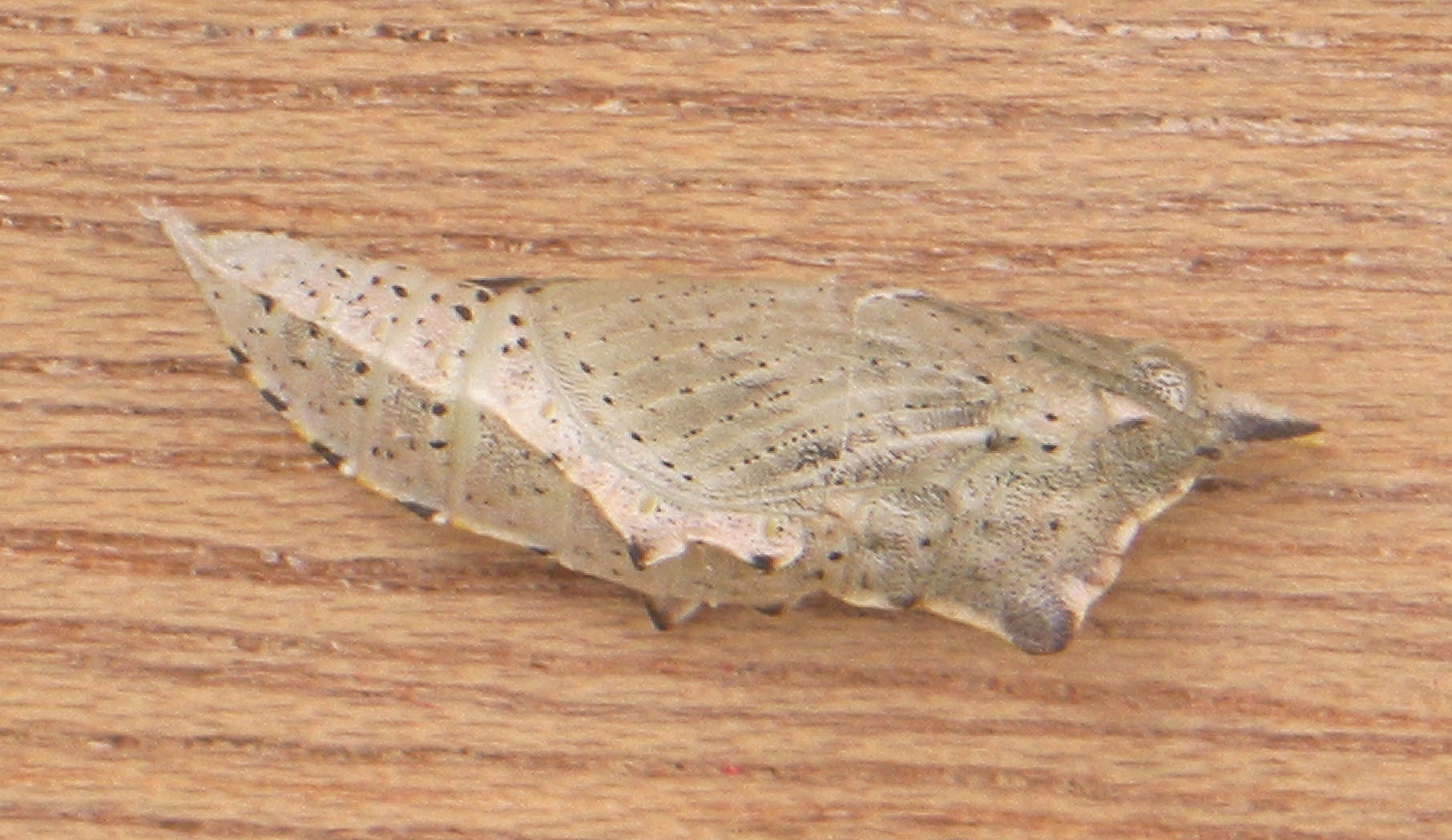 Pieris rapae (Klein koolwitje)